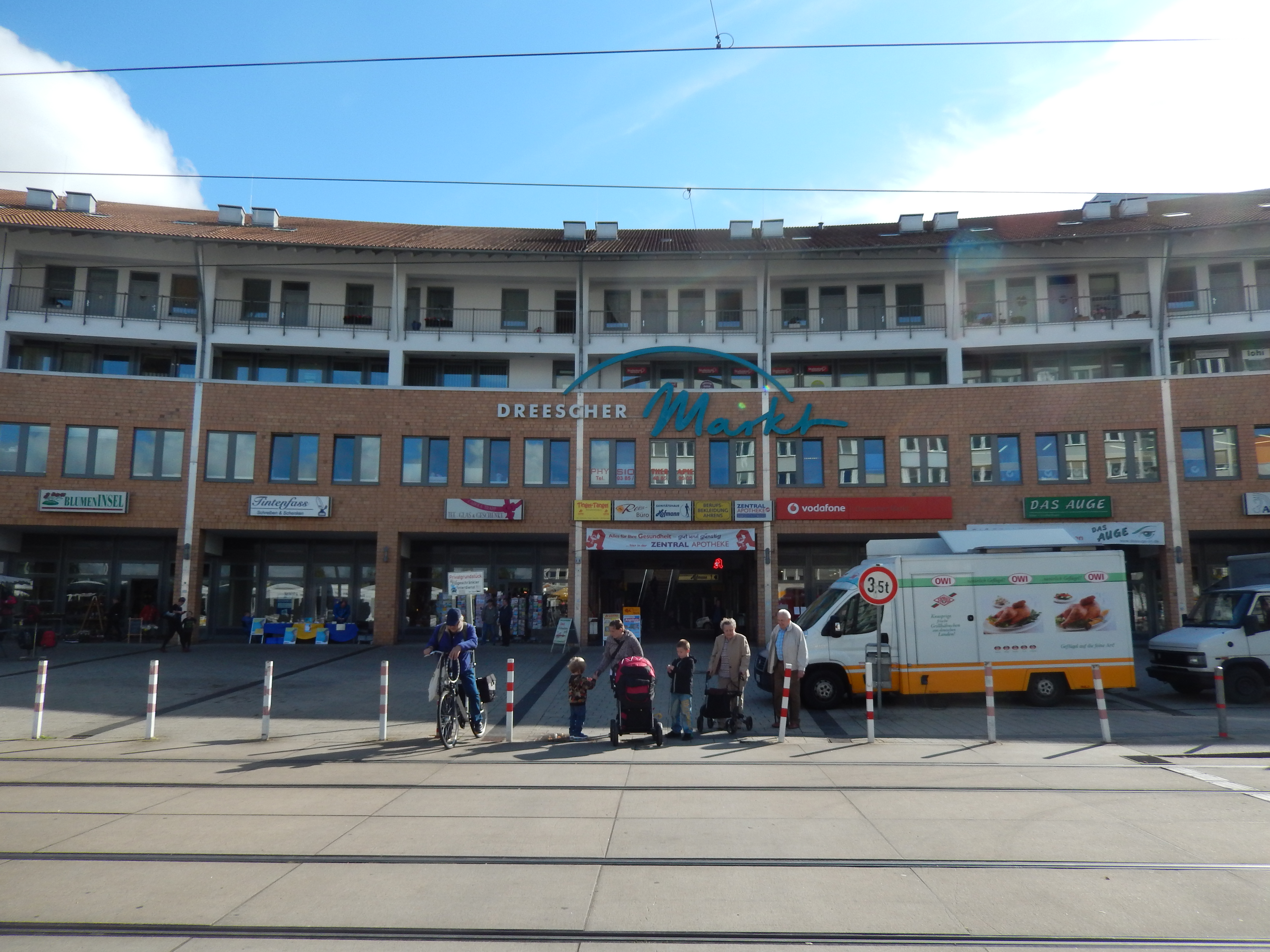 Einkaufs- und Bürohaus Dreescher Markt in Schwerin